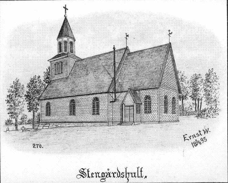 Teckning av kyrkan mot sydöst 1895.